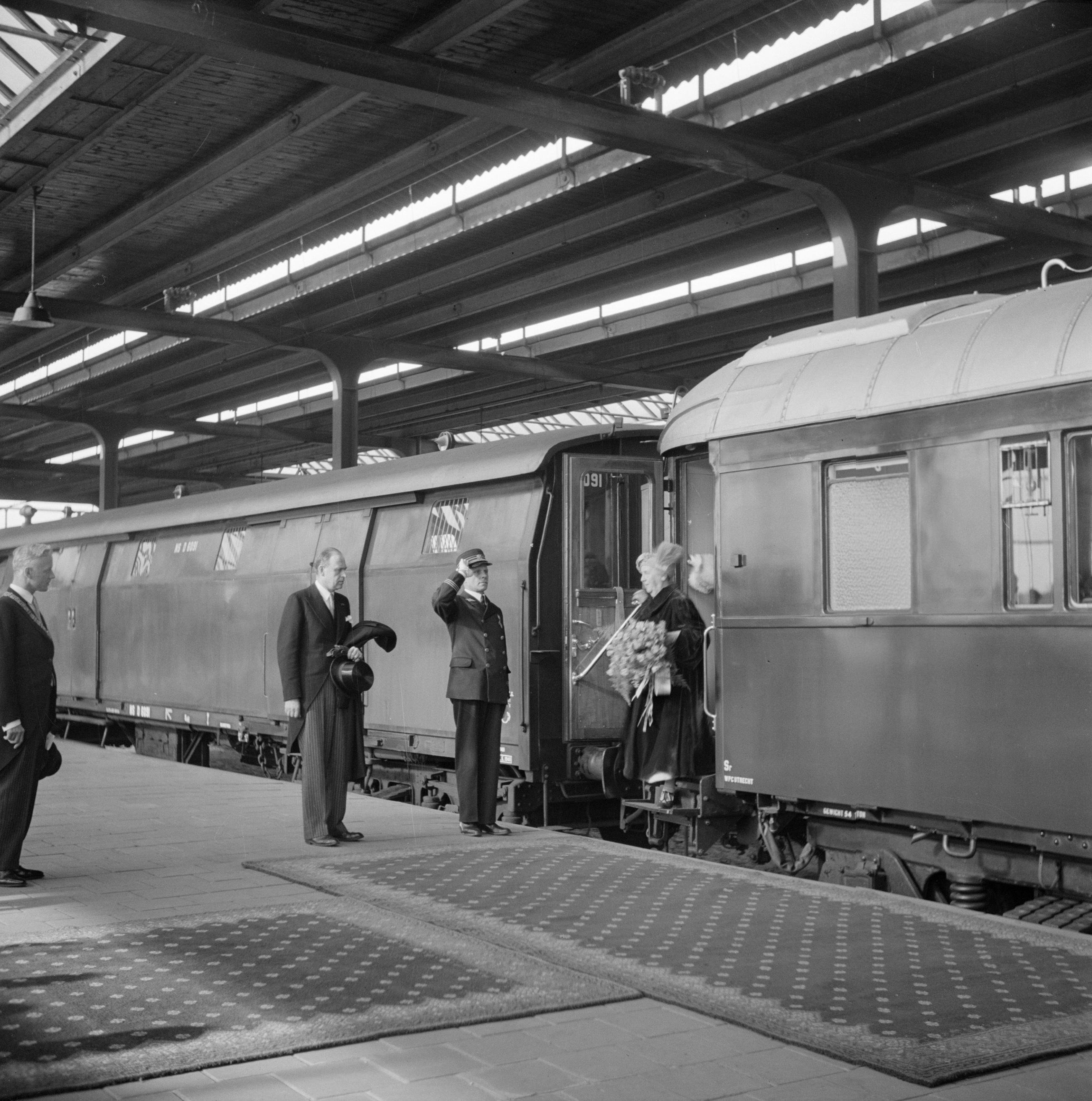 Collectie / Archief : Fotocollectie Van de Poll Reportage / Serie : Vijftigjarig regeringsjubileum van koningin Wilhelmina Beschrijving : Aankomst koningin Wilhelmina (voor het laatst als regerend vorstin) op het Amstelstation, voor haar intocht in Amsterdam. Zij wordt begroet door de burgemeester A.J. d'Ailly. Datum : 30 augustus 1948 Locatie : Amsterdam, Noord-Holland Trefwoorden : jubilea, koninginnen, koninklijk huis, stations, treinen Persoonsnaam : Ailly, A.J. d', Wilhelmina, koningin Fotograaf : Poll, Willem van de Auteursrechthebbende : Nationaal Archief Materiaalsoort : Negatief (zwart/wit) Nummer archiefinventaris : bekijk toegang 2.24.14.02 Bestanddeelnummer : 255-7022